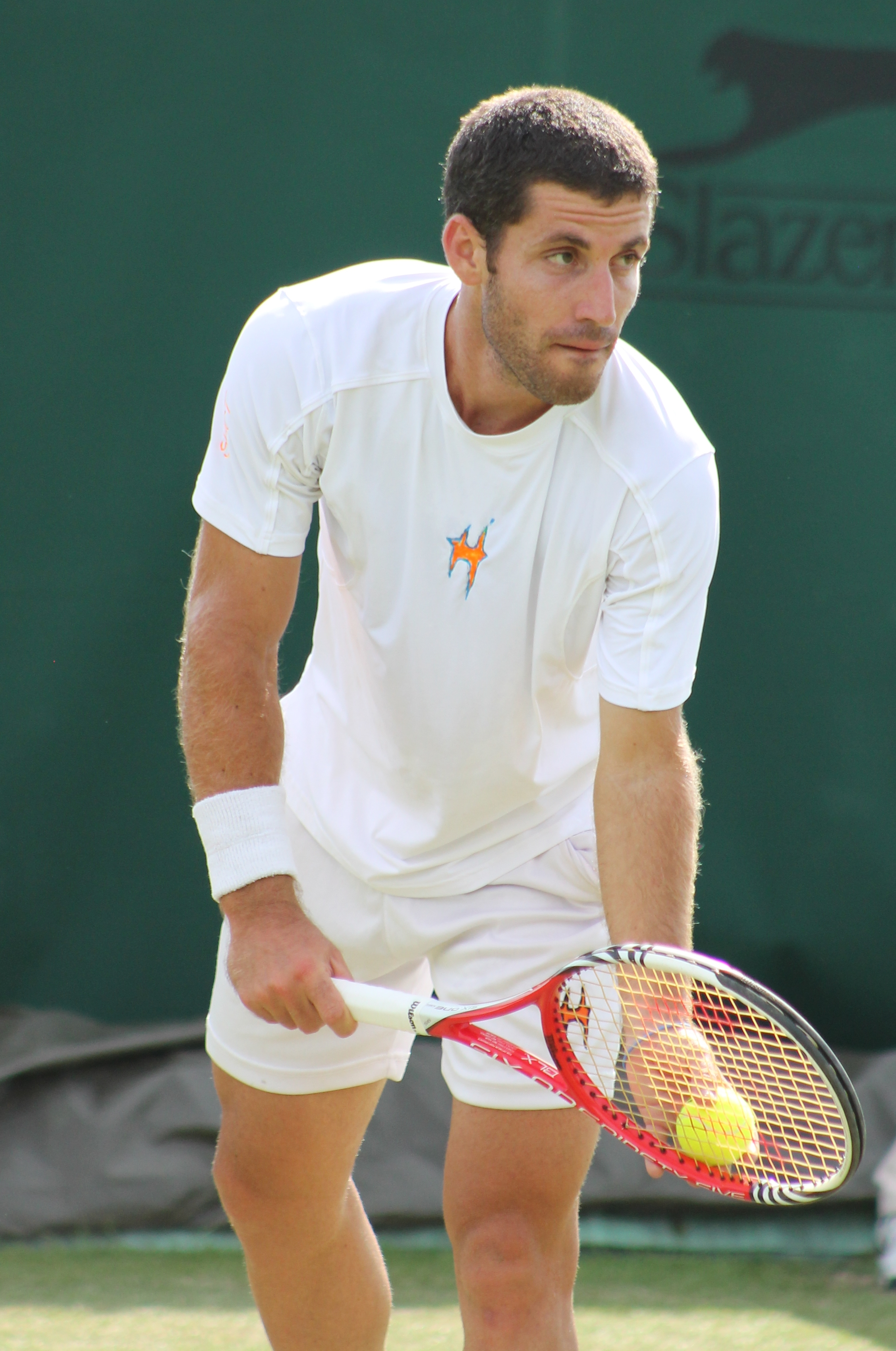 Cipolla WMQ14 (25)